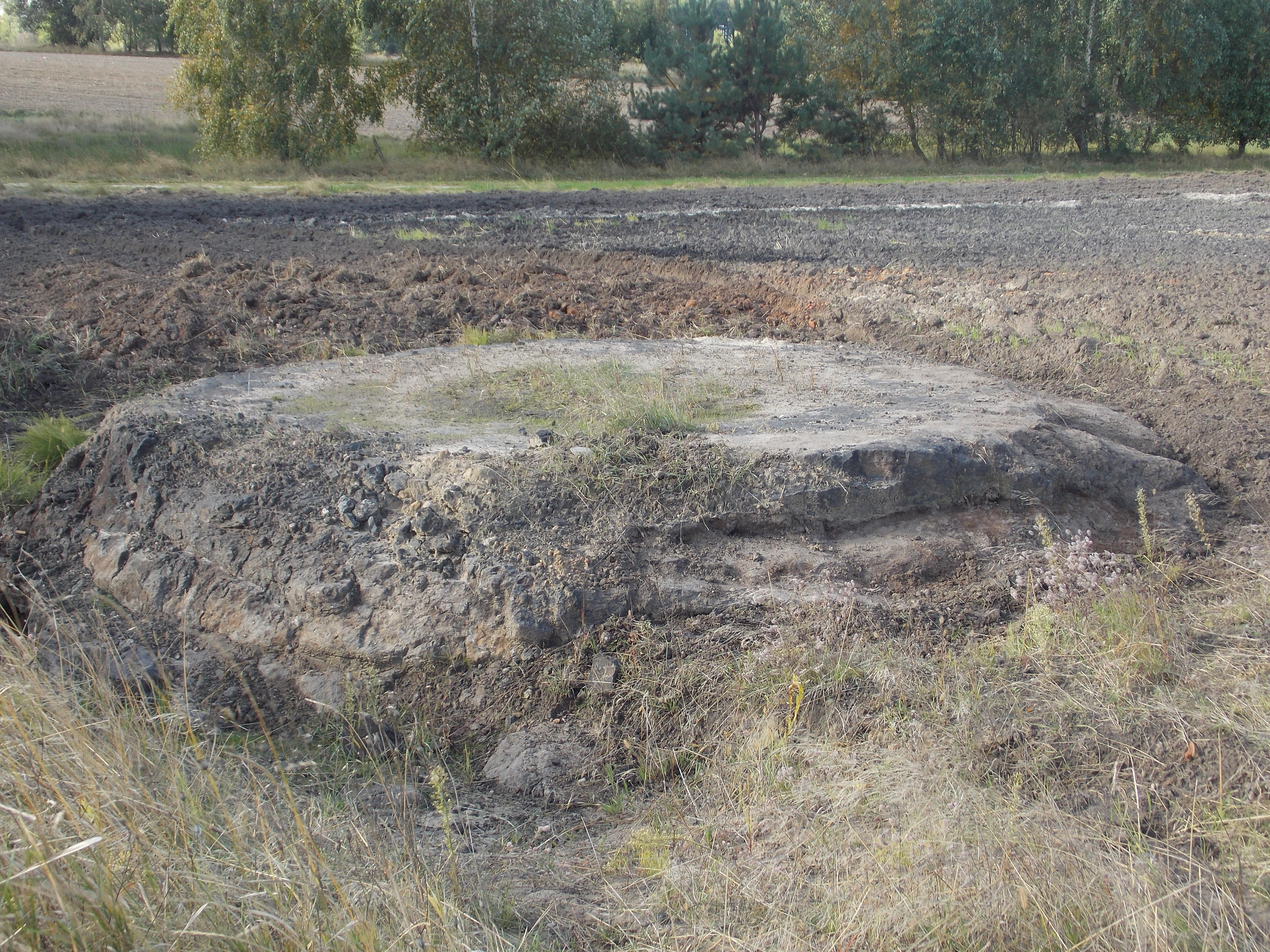 Smolny piec w Sycynie na Podlasiu XVII w.